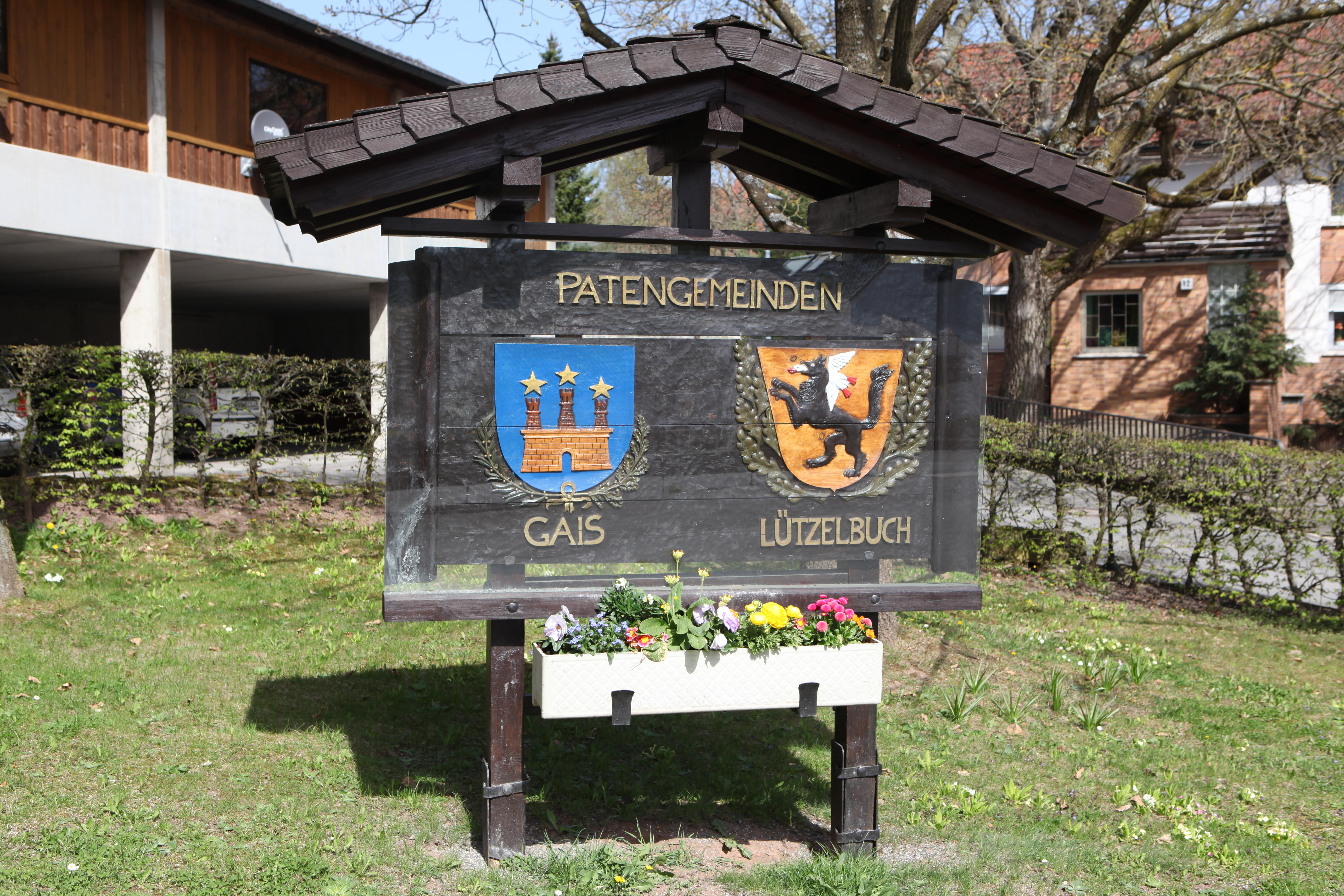 Wappen Lützelbuch, Coburg